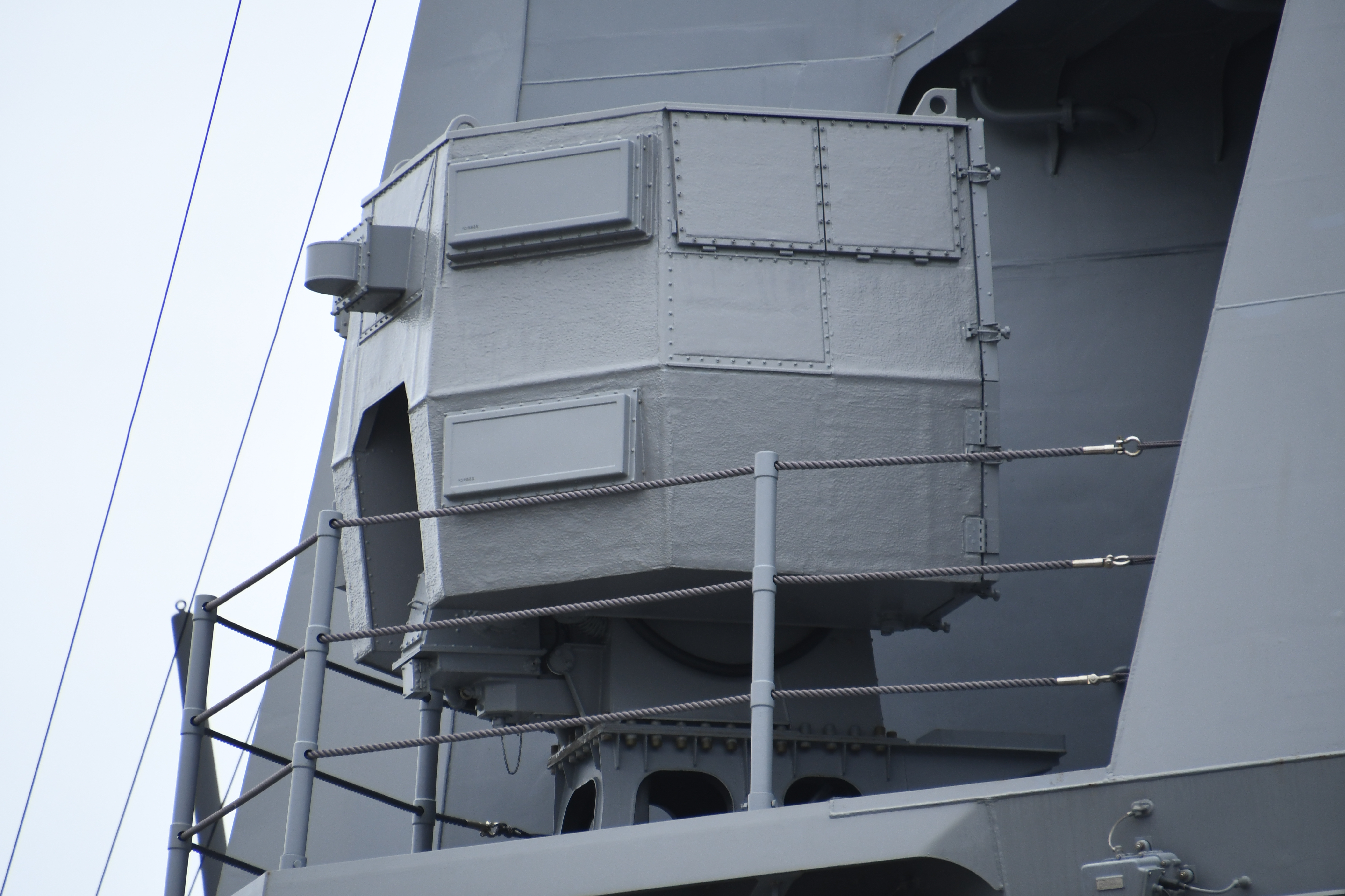 海上自衛隊 護衛艦しらぬい（DD-120） 艦橋上部のNOLQ-3D-2電子戦装置（ECM装置） 右舷前面。2019年10月14日 舞鶴基地にて。